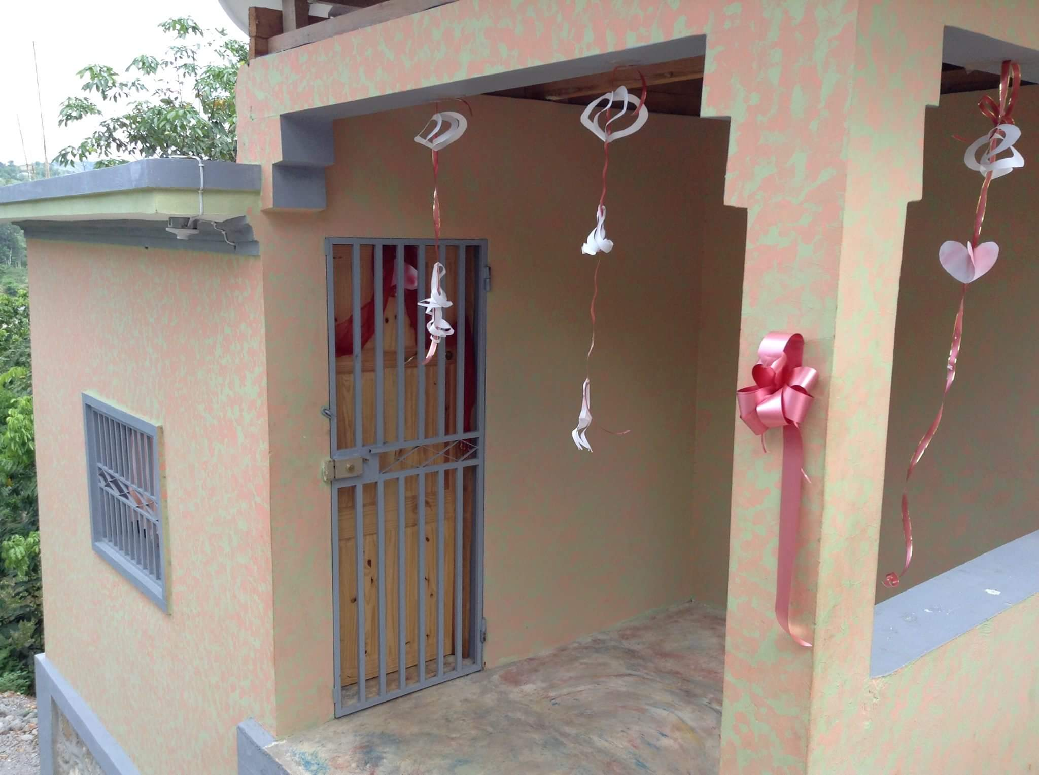 Marfranc